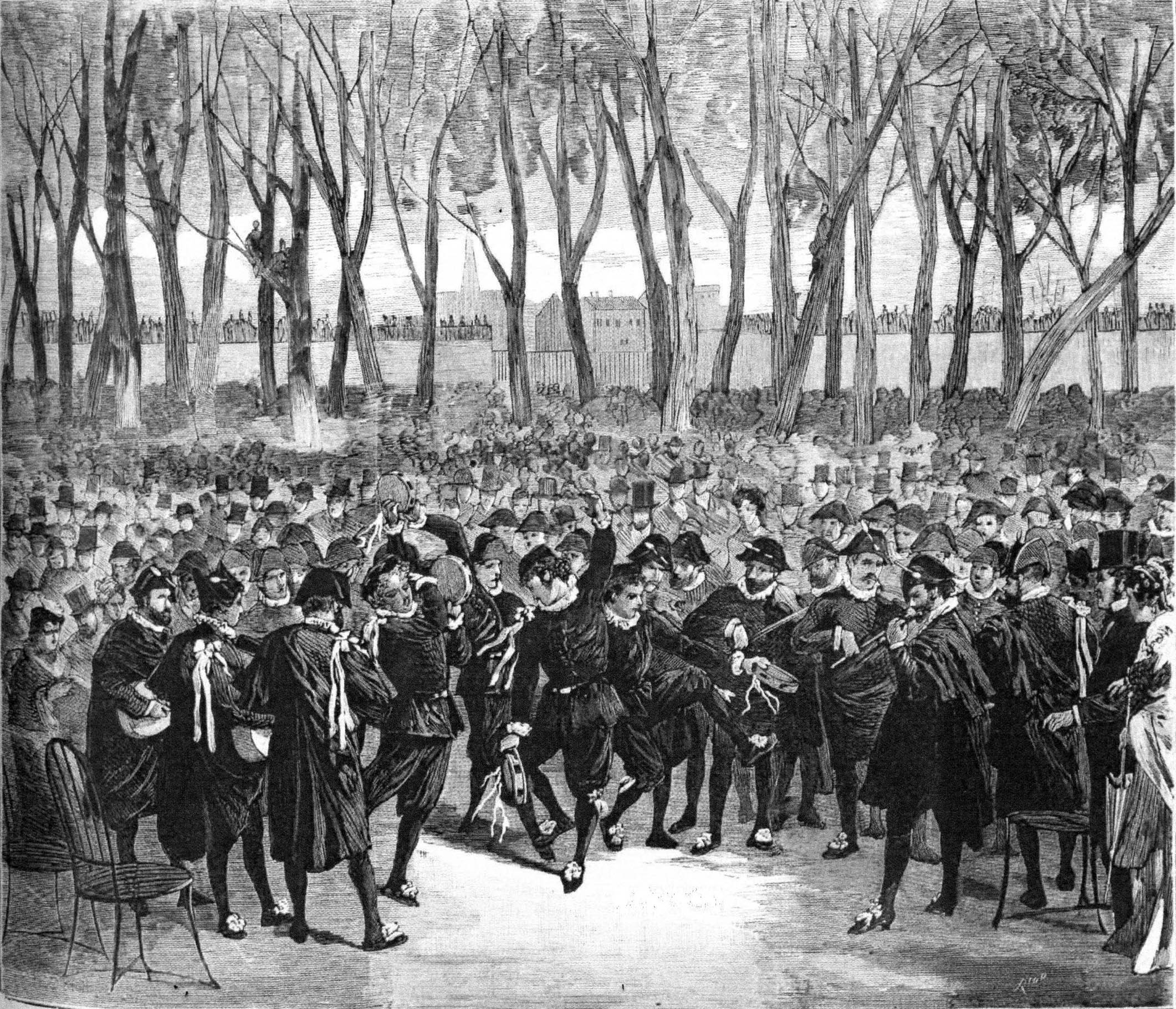 Au jardin des Tuileries, à Paris, la foule entoure, le Mardi Gras 1878, la troupe étudiante espagnole de l'Estudiantina Espagnola.